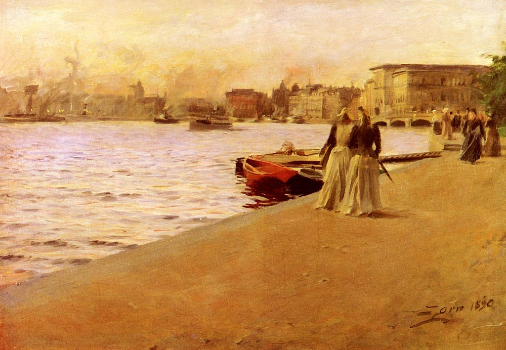 Utsikt från SkeppsholmskajenView from Skeppsholm quaytitle QS:P1476,sv:"Utsikt från Skeppsholmskajen" label QS:Lsv,"Utsikt från Skeppsholmskajen" label QS:Lfr,"Vue depuis le quai de Skeppsholm" label QS:Lnl,"Uitzicht vanaf de kade van Skeppsholm" label QS:Lde,"Blick vom Skeppsholm-Kai" label QS:Lpt,"Vista do cais de Skeppsholm" label QS:Len,"View from Skeppsholm quay"